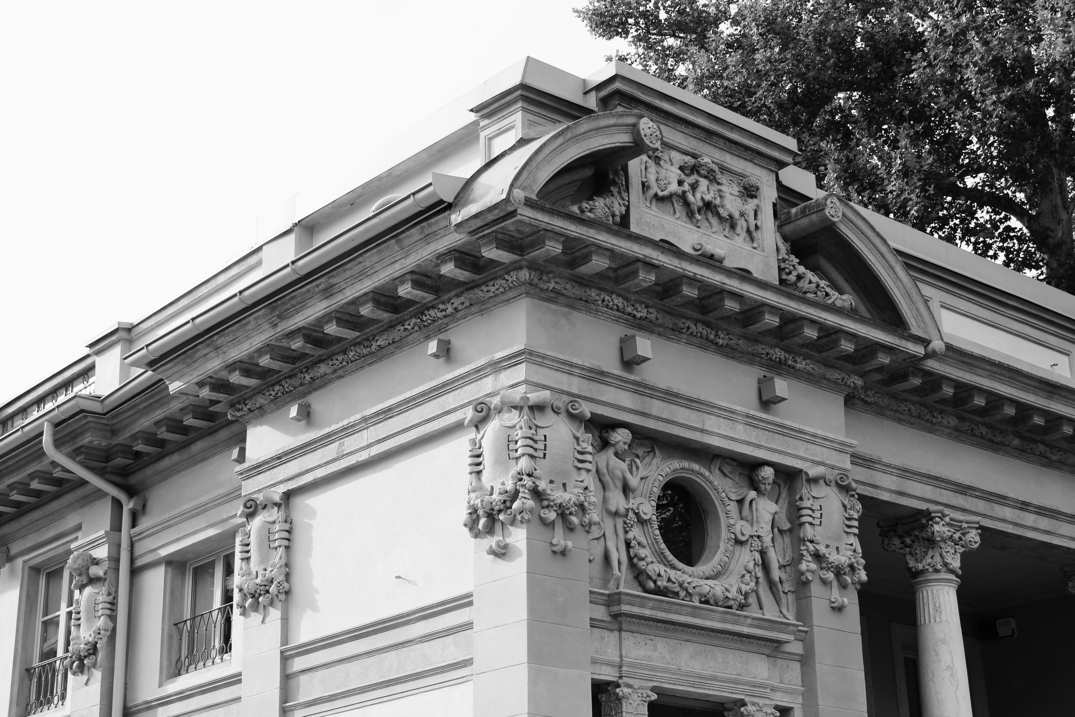 Palazzina Liberty This is a photo of a monument which is part of cultural heritage of Italy.